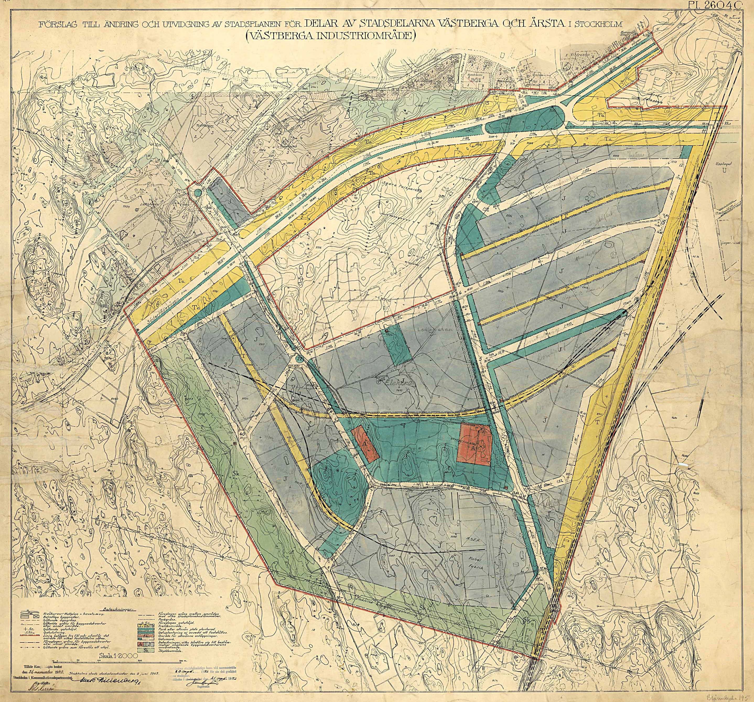 Stadsplan för Västberga industriområde